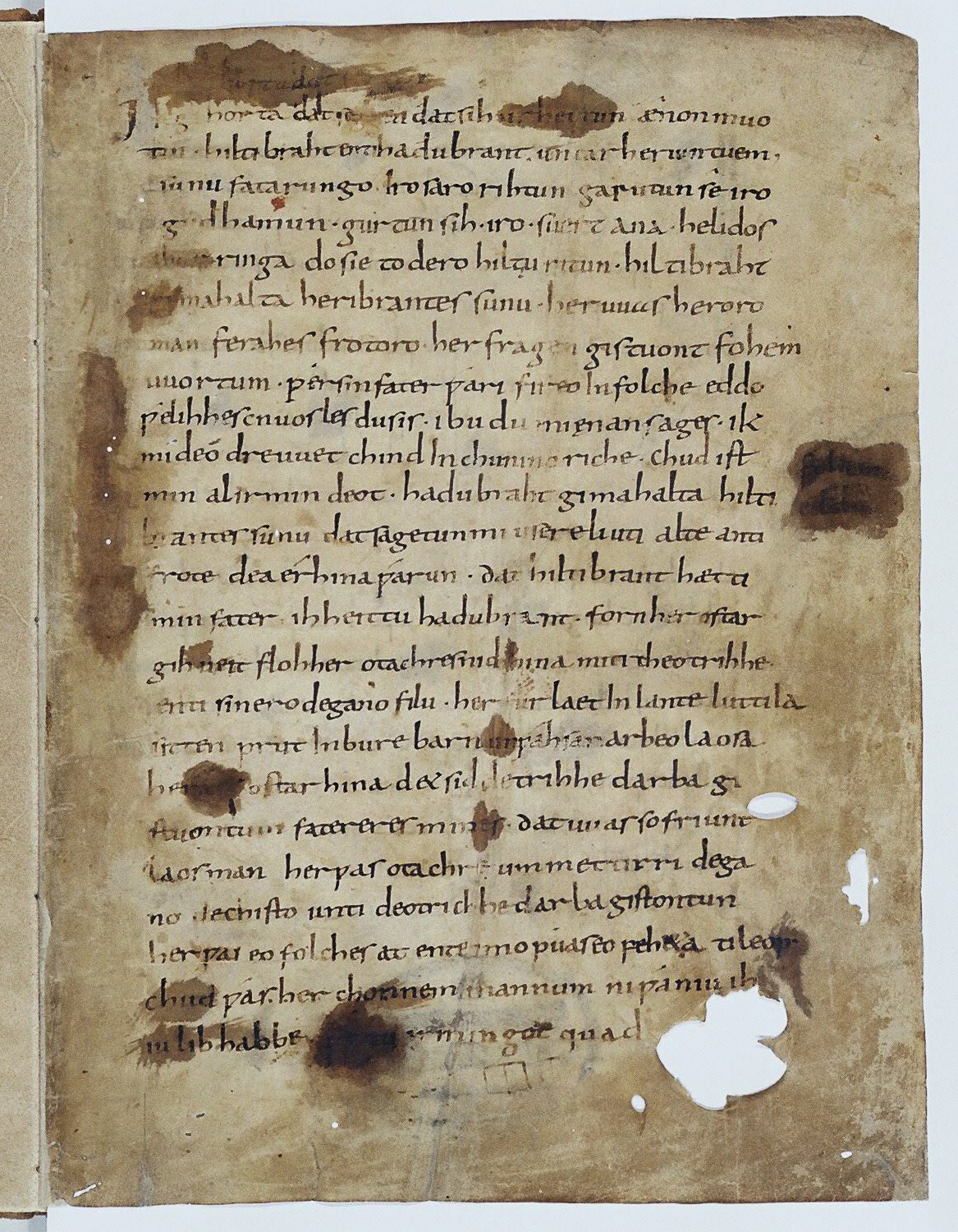 2 Ms theol